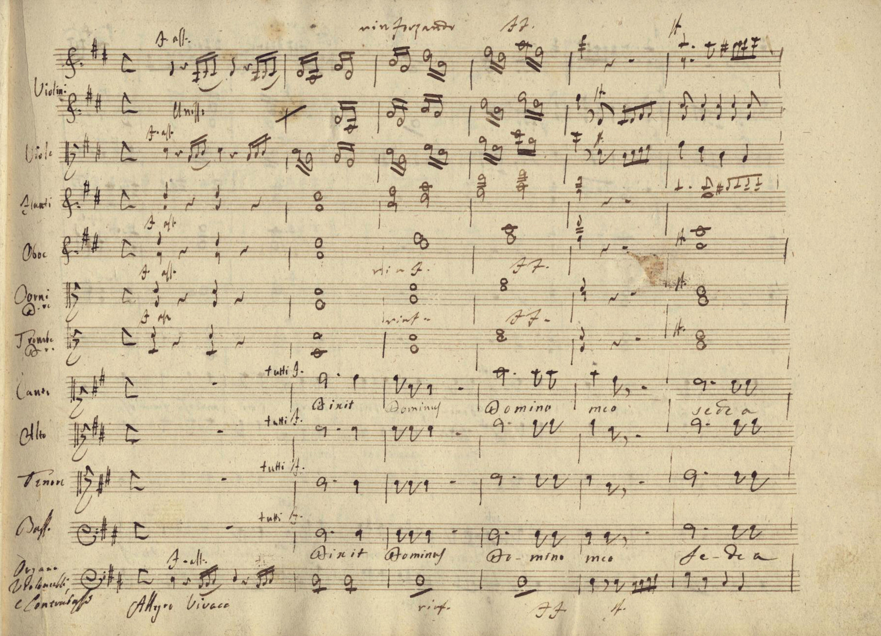 Eigenhändiges Manuskript Perottis